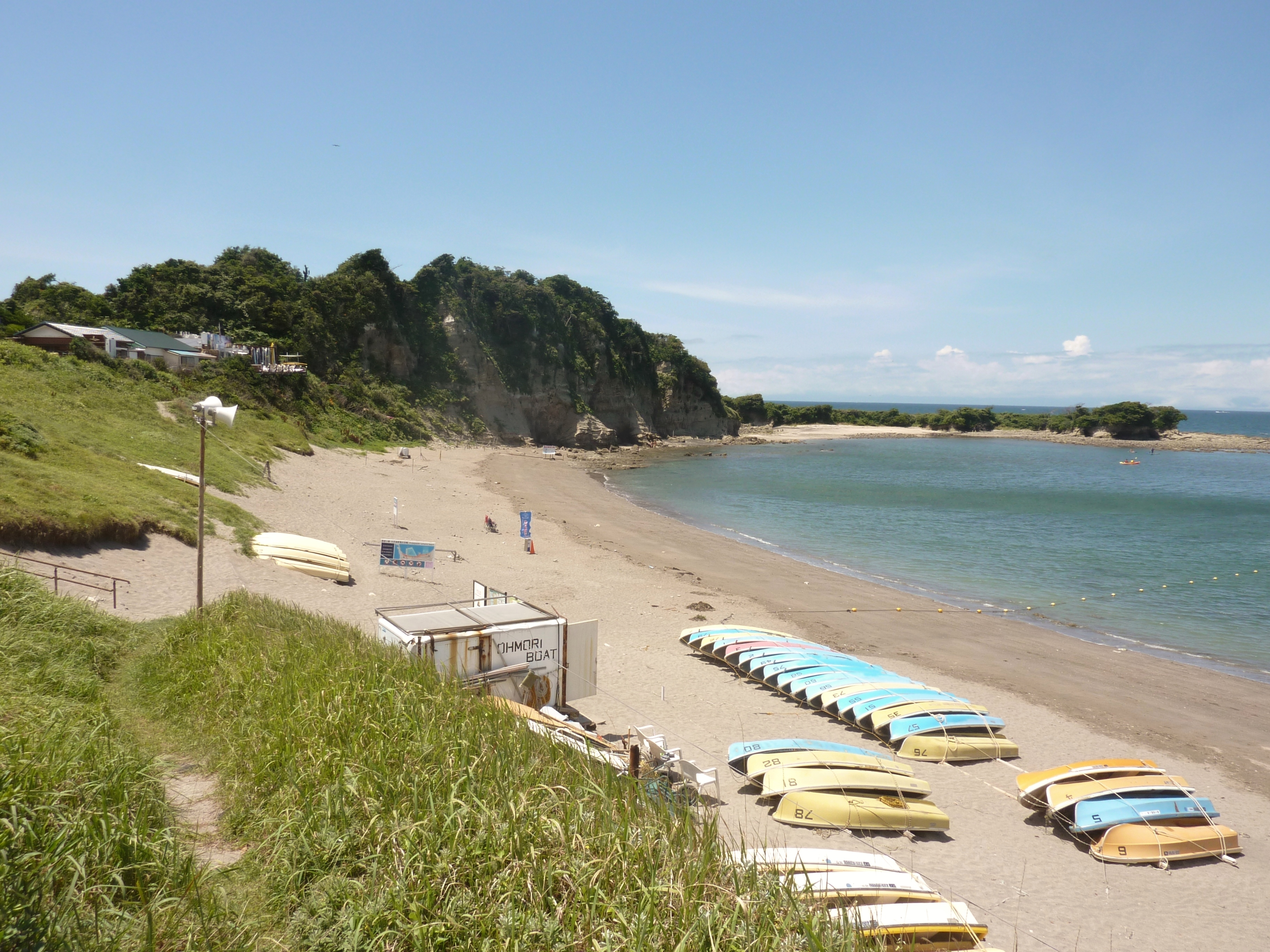 長者ヶ崎と長者ヶ崎海水浴場(神奈川県葉山町)